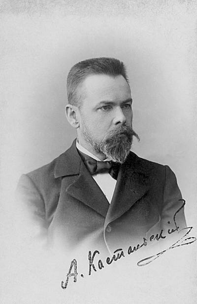 Александр Дмитриевич Кастальский